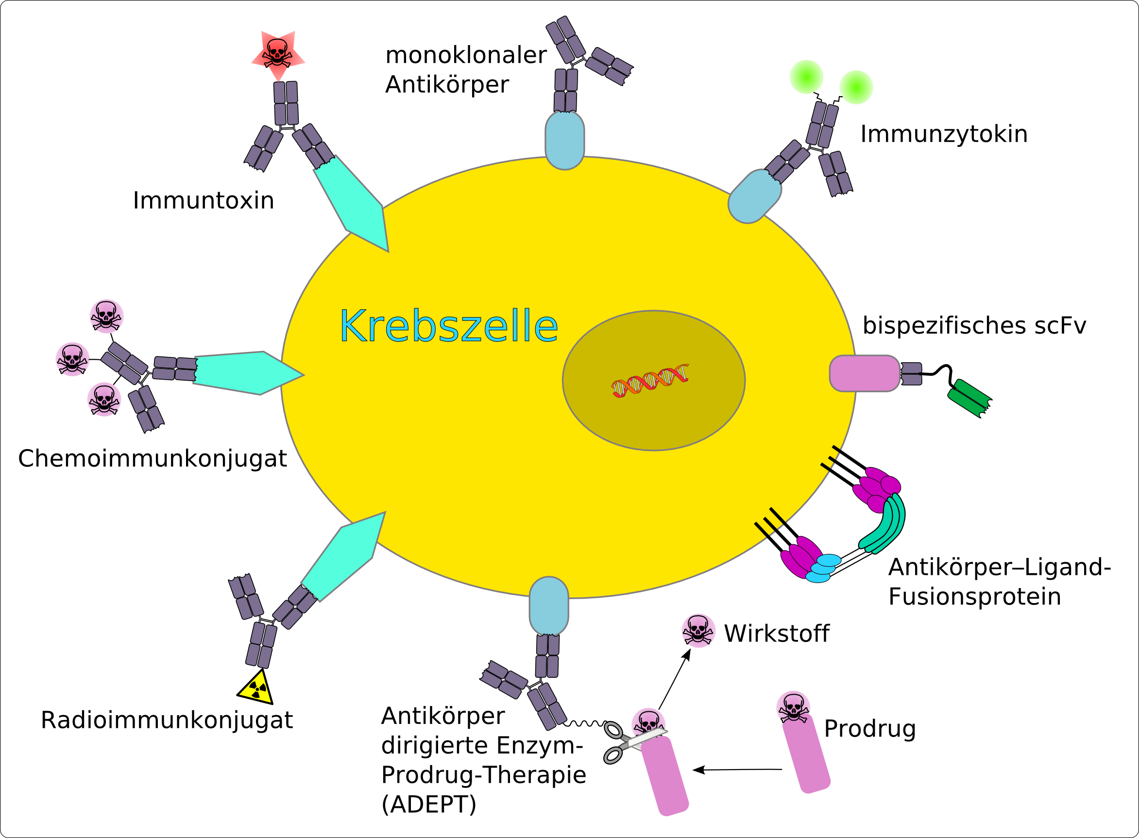 Schematische Darstellung der verschiedenen Konzepte des Einsatzes von Antikörpern in der Krebstherapie (Armed Antibodies). Darstellung nach D. Schrama u. a.: Antibody targeted drugs as cancer therapeutics. In: Nat Rev Drug Discov 5, 2006, S. 147-159. PMID 16424916